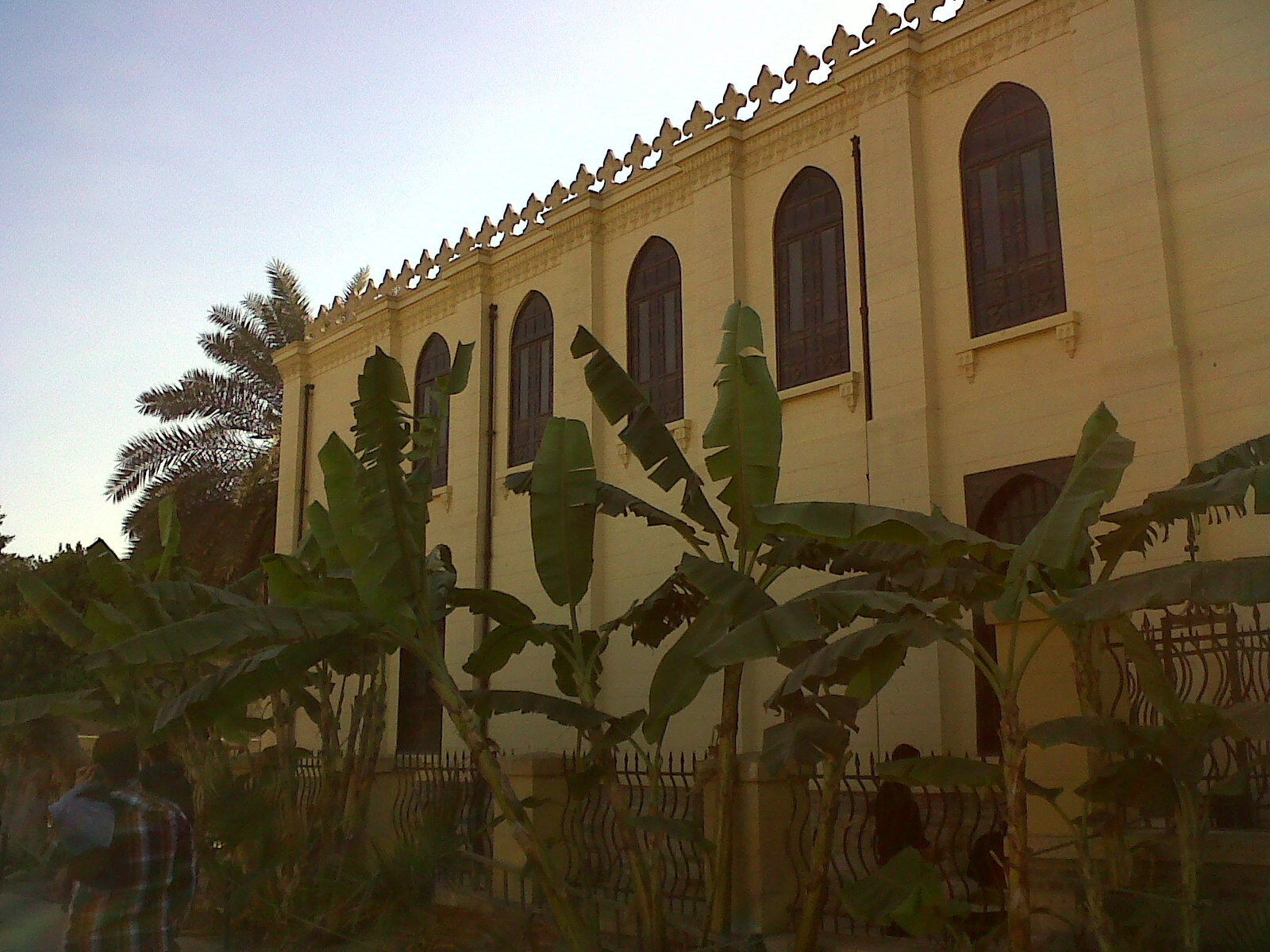 معبد بن عزرا من الخارج، القاهرة.